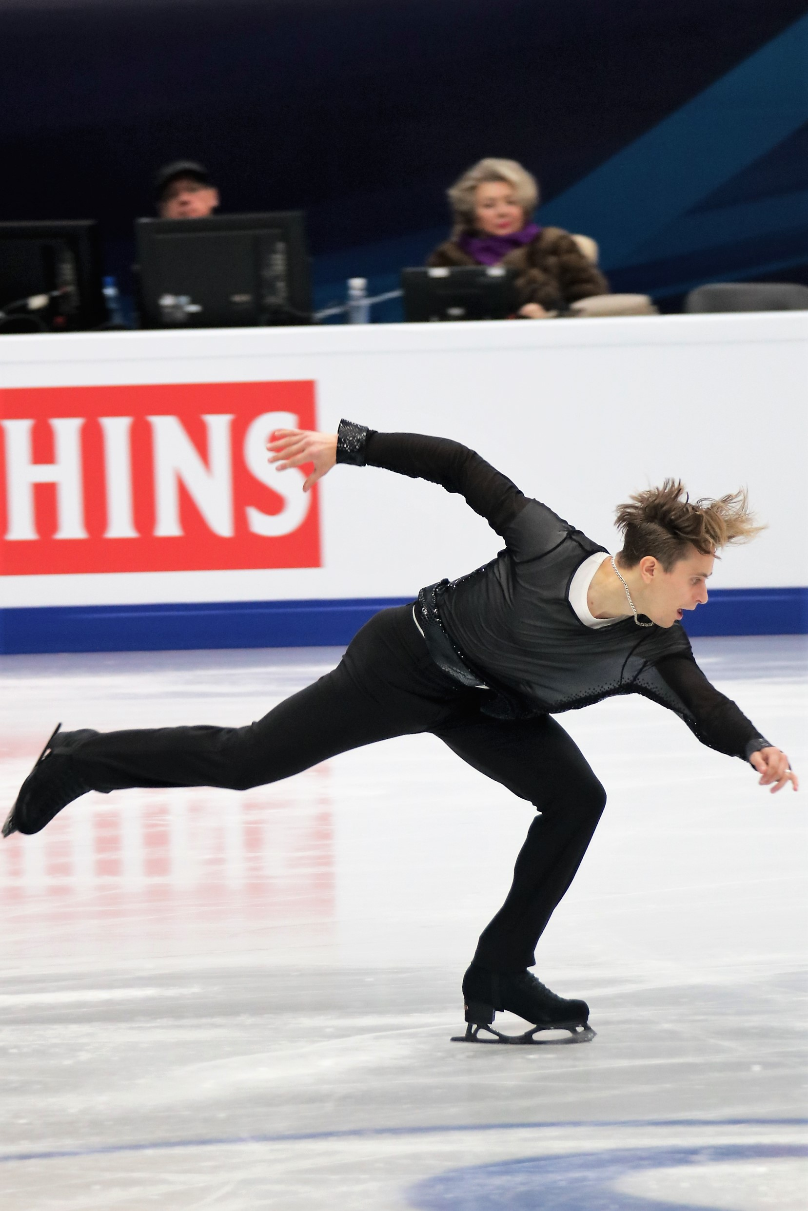 Михал Бржезина (Чехия) на Чемпионате Европы по фигурному катанию 2018.